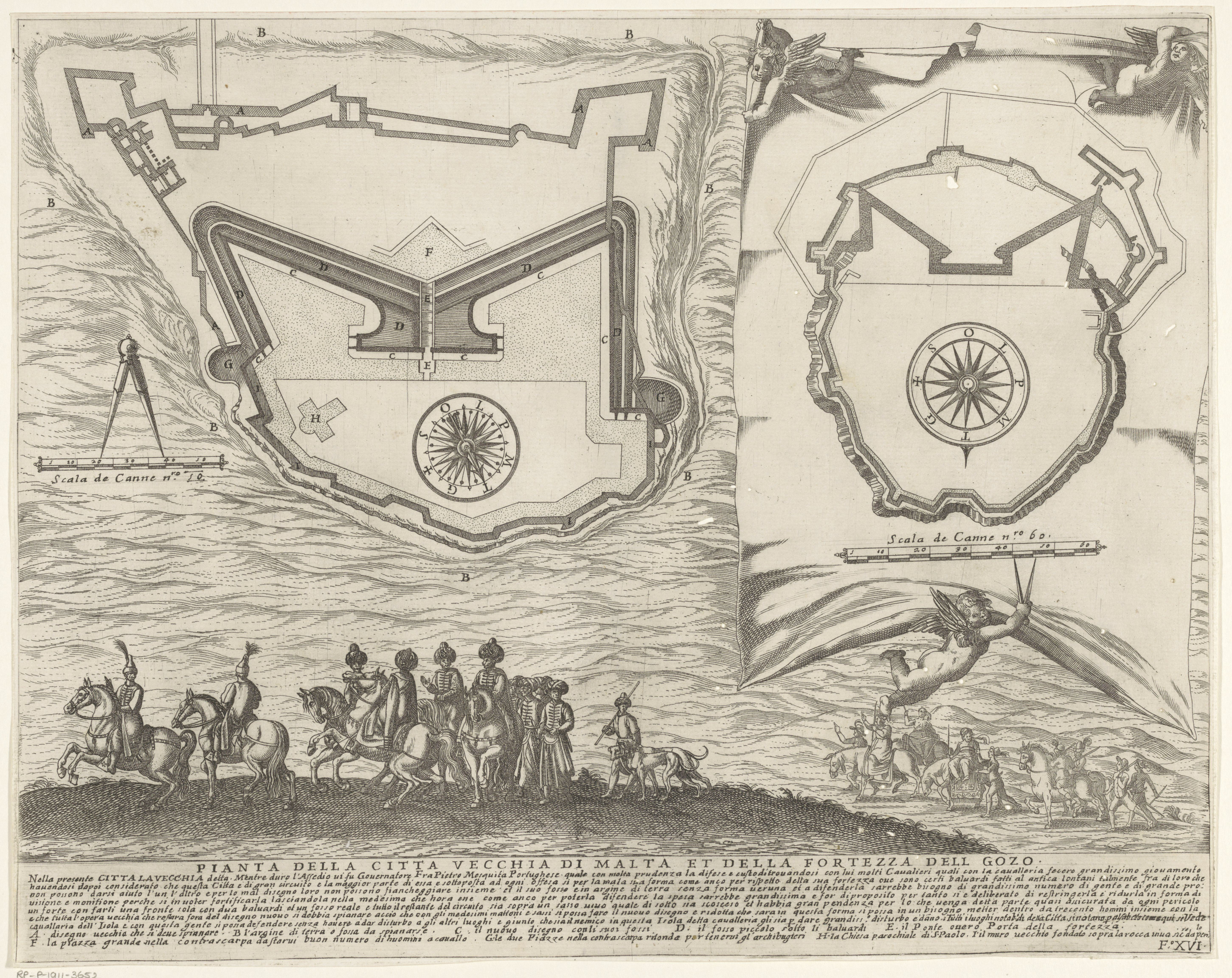 IdentificatieTitel(s): Twee plattegronden van een stad op Malta en van GozoPianta della citta vecchia di Malta et della fortezza dell Gozo (titel op object)De belegering van Malta (serietitel)Objecttype: prent Objectnummer: RP-P-1911-3652Catalogusreferentie: LeBlanc 1-16Opschriften / Merken: verzamelaarsmerk, verso, gestempeld: Lugt 2228Omschrijving: Twee plattegronden van een stad op Malta en van Gozo. Onder Turkse soldaten te paard. Italiaanse teks en een verklarende lijst met nummers in ondermarge. Genummerd rechtsonder: Fo. XVI.VervaardigingVervaardiger: prentmaker: Antonio Francesco Luciniuitgever: Nicolo AllegriPlaats vervaardiging: prentmaker: Italiëuitgever: RomeDatering: 1665Fysieke kenmerken: gravureMateriaal: papier Techniek: graveren (drukprocedé)Afmetingen: plaatrand: h 395 mm × b 430 mmToelichtingPrent uit een reeks van 15 prenten (+ titelprent) over de belegering van Malta.OnderwerpWat: islandAsiatic races and peoples: Turksde soldaat; het leven van een soldaatkaarten, atlassenWaar: MaltaGozoVerwerving en rechtenCredit line: Schenking van de heer M. Onnes van NijenrodeVerwerving: schenking 1911Copyright: Publiek domein